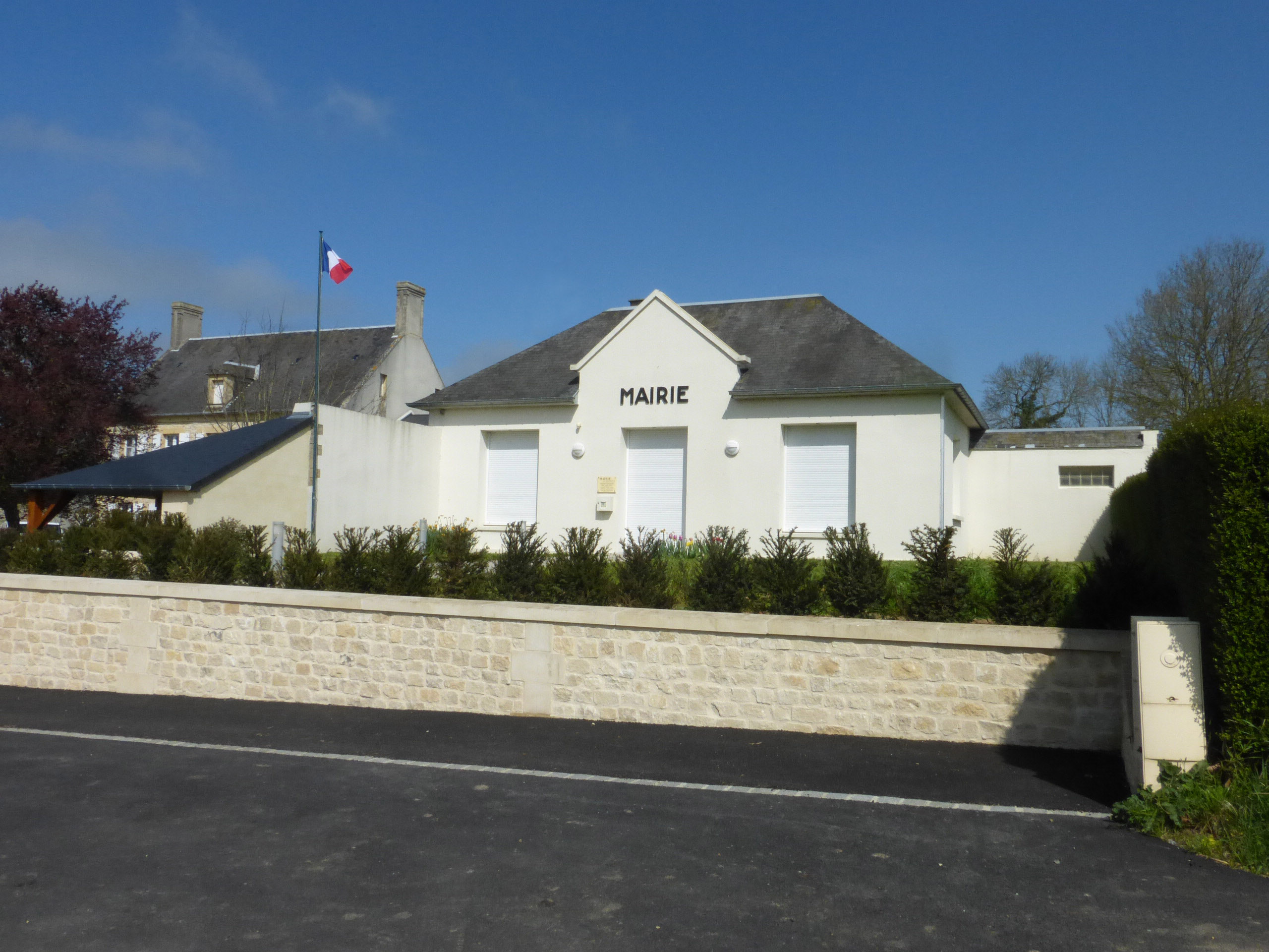 Maisons (Calvados)